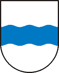 Wappen von Gurtweil